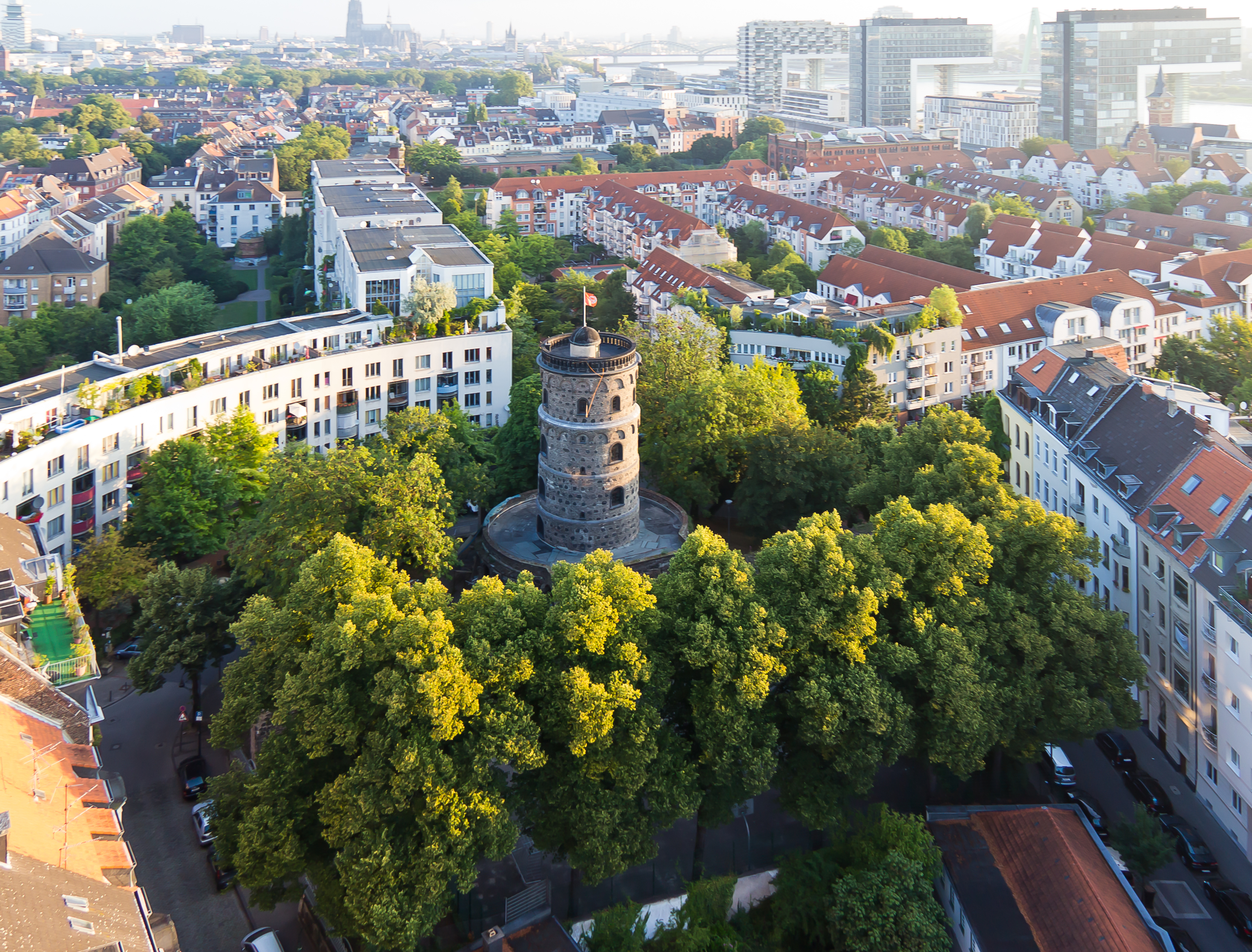 Ballonfahrt über Köln - Bottmühle